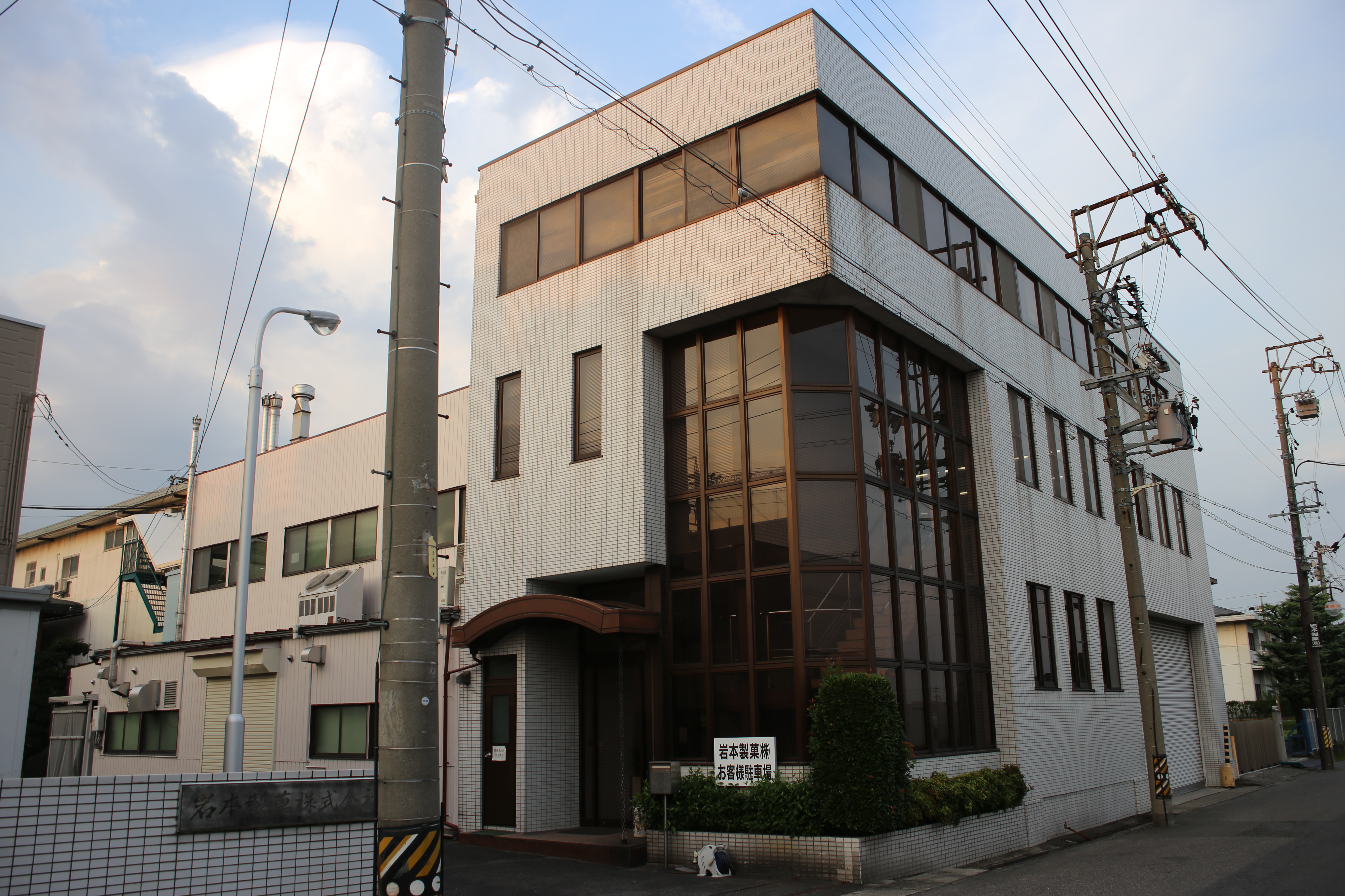 愛知県稲沢市日下部北町の岩本製菓本社を南側公道西側より撮影